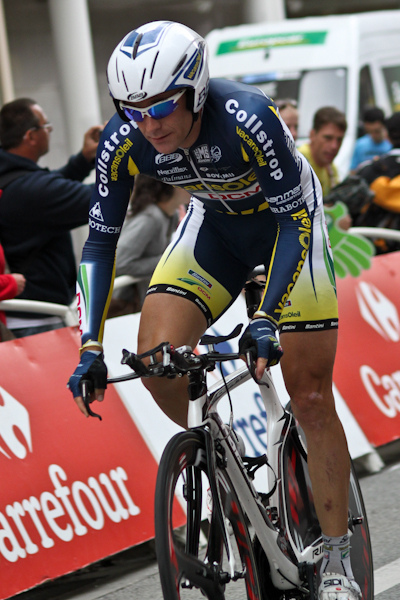 Borut Bozic